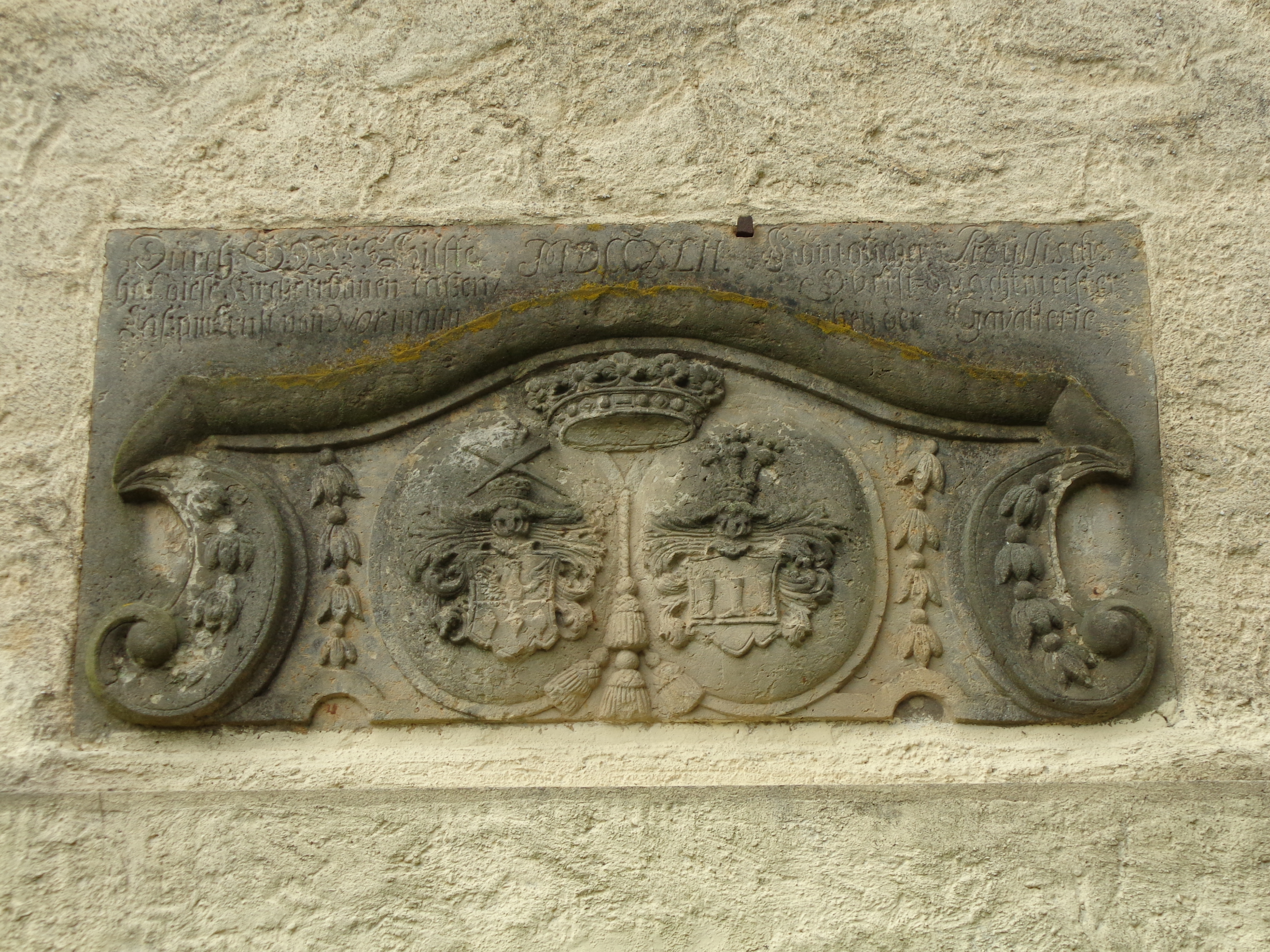 Dorfkirche Illmersdorf, Stifterinschrift an der Westseite, Illmersdorf, Gemeindeteil von Casel, Ortsteil der Stadt Drebkau, Landkreis Spree-Neiße, Brandenburg